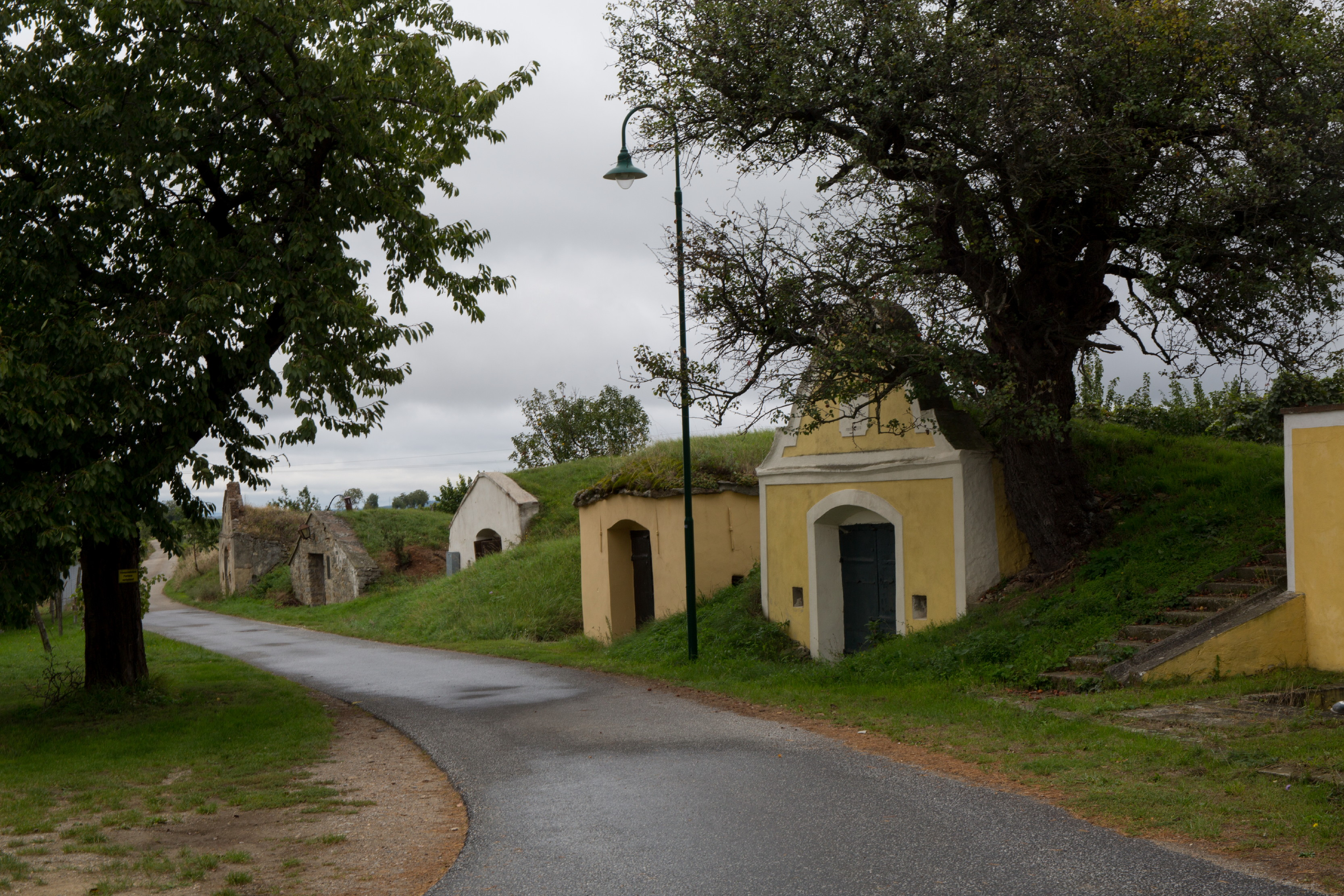 Kellergasse Groß–Reipersdorf, An der Bundesstraße